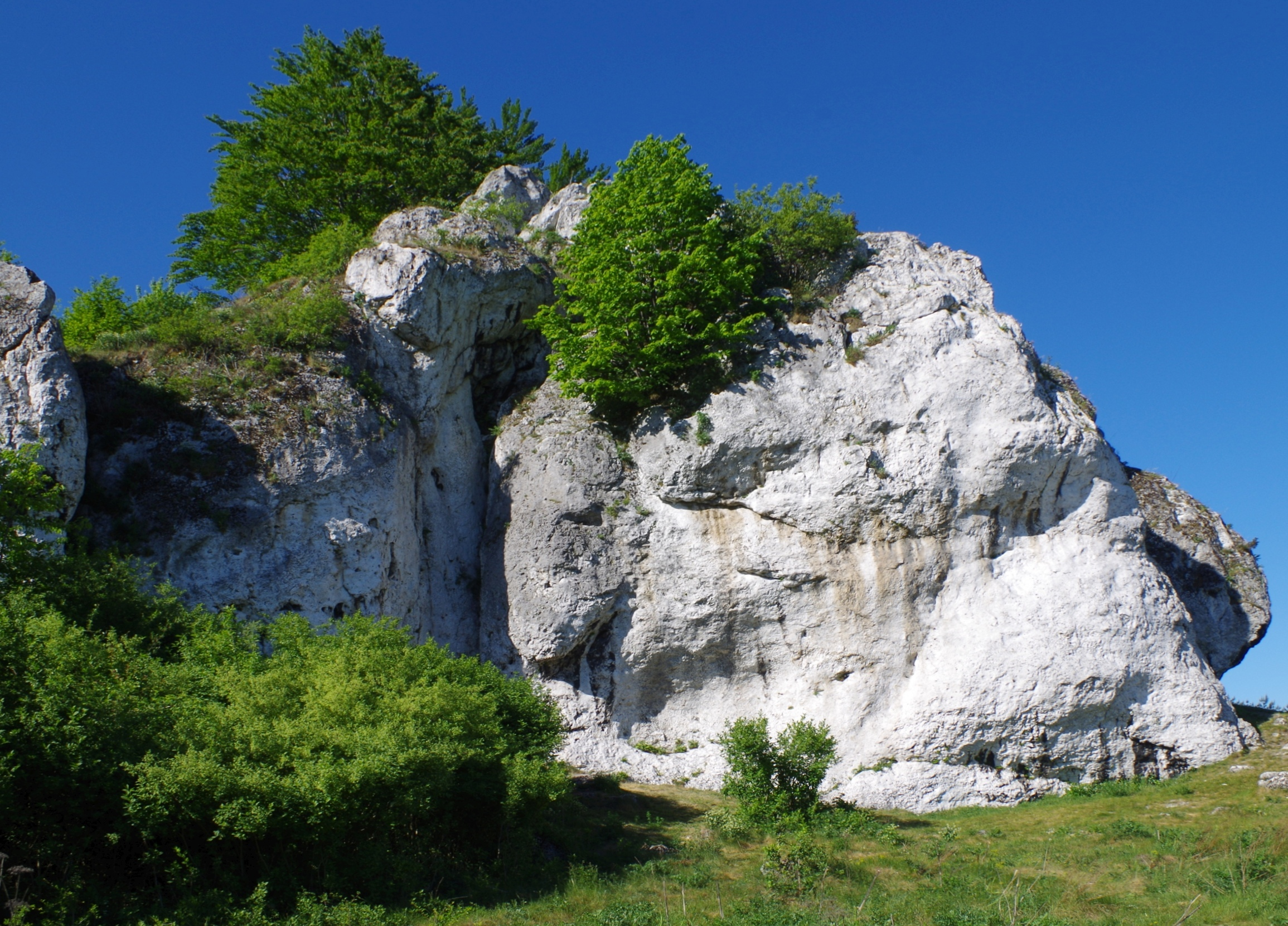 Turnia nad Garażem w Skałach Rzędkowickich